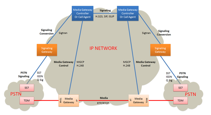 Монгол: suljee